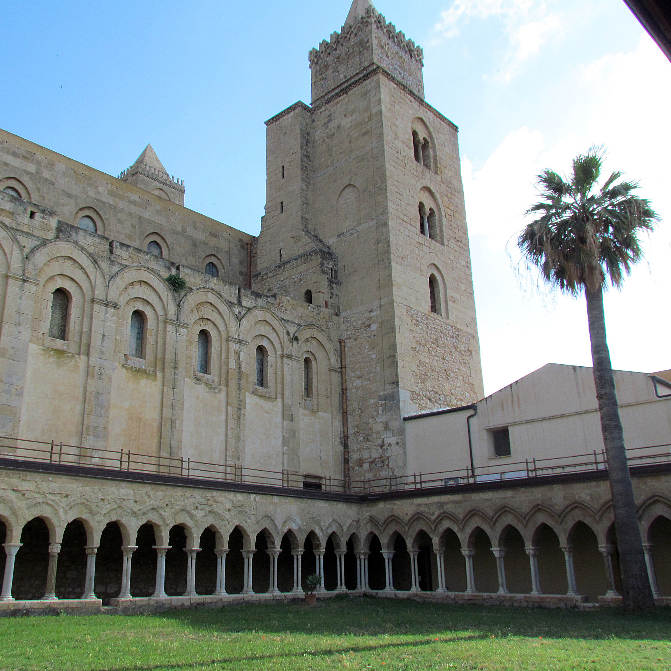 Il Chiostro della Cattedrale di Cefalu